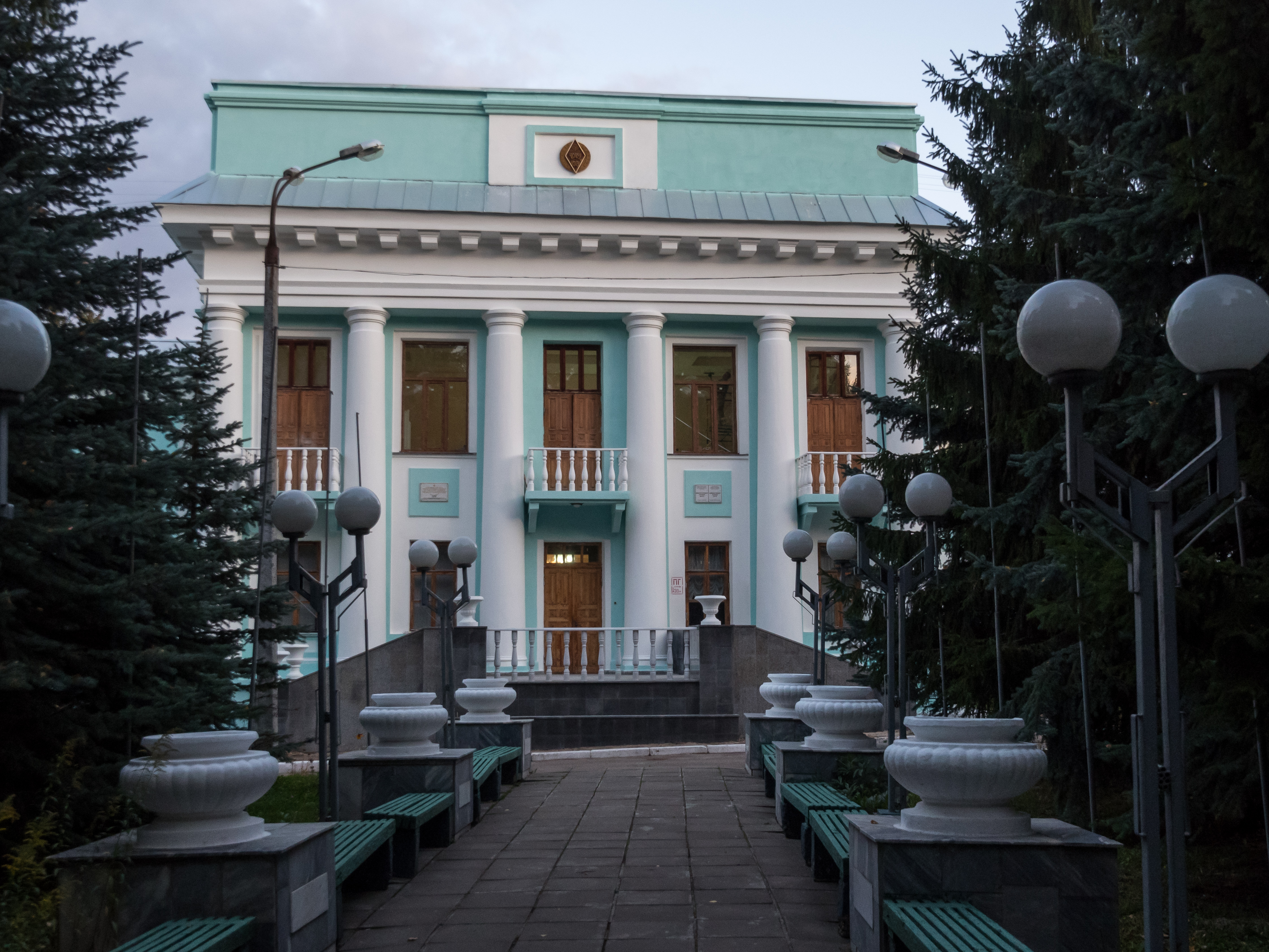 Здание Чебоксарского медицинского техникума